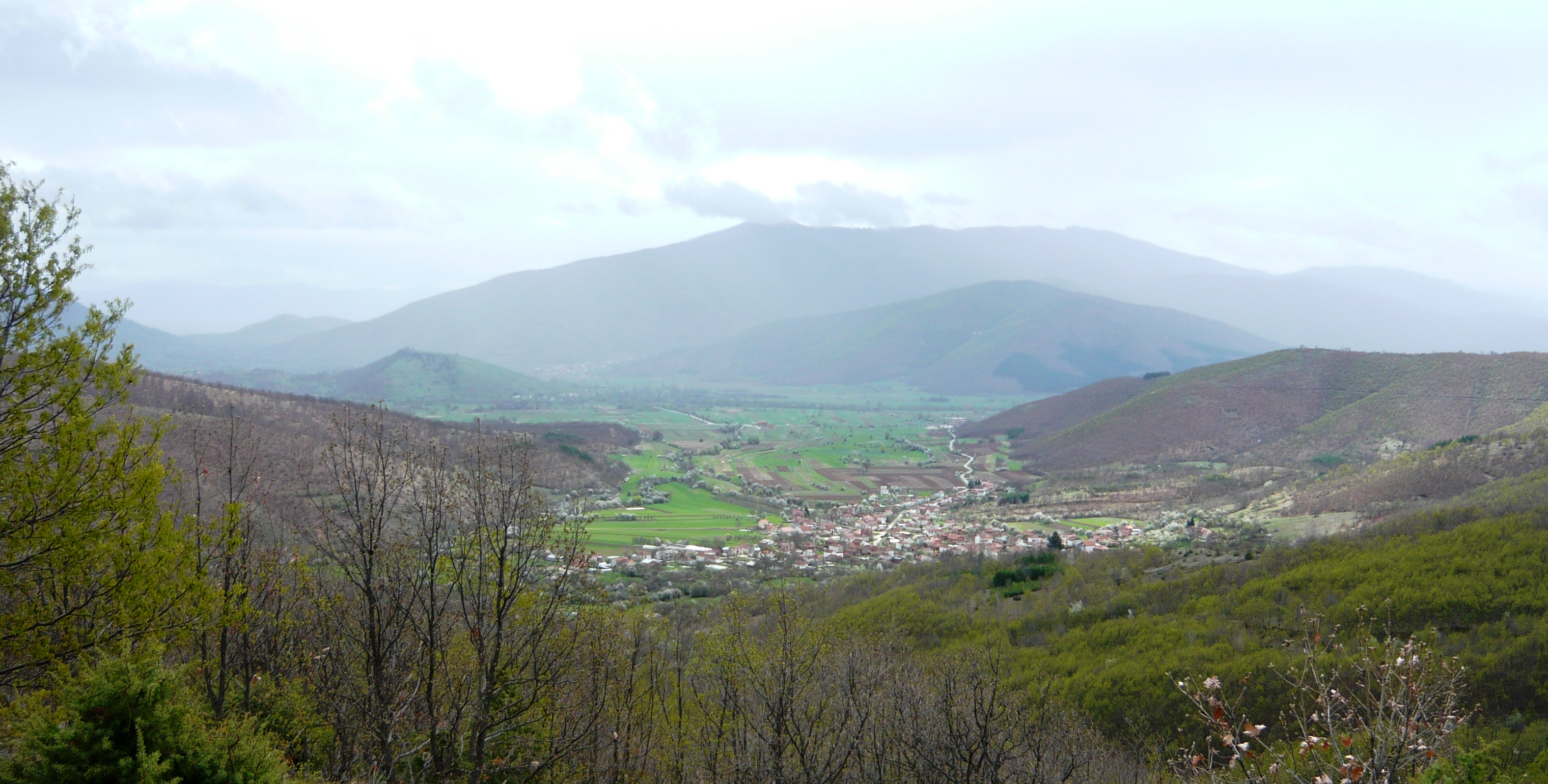 Панорама на Слепче